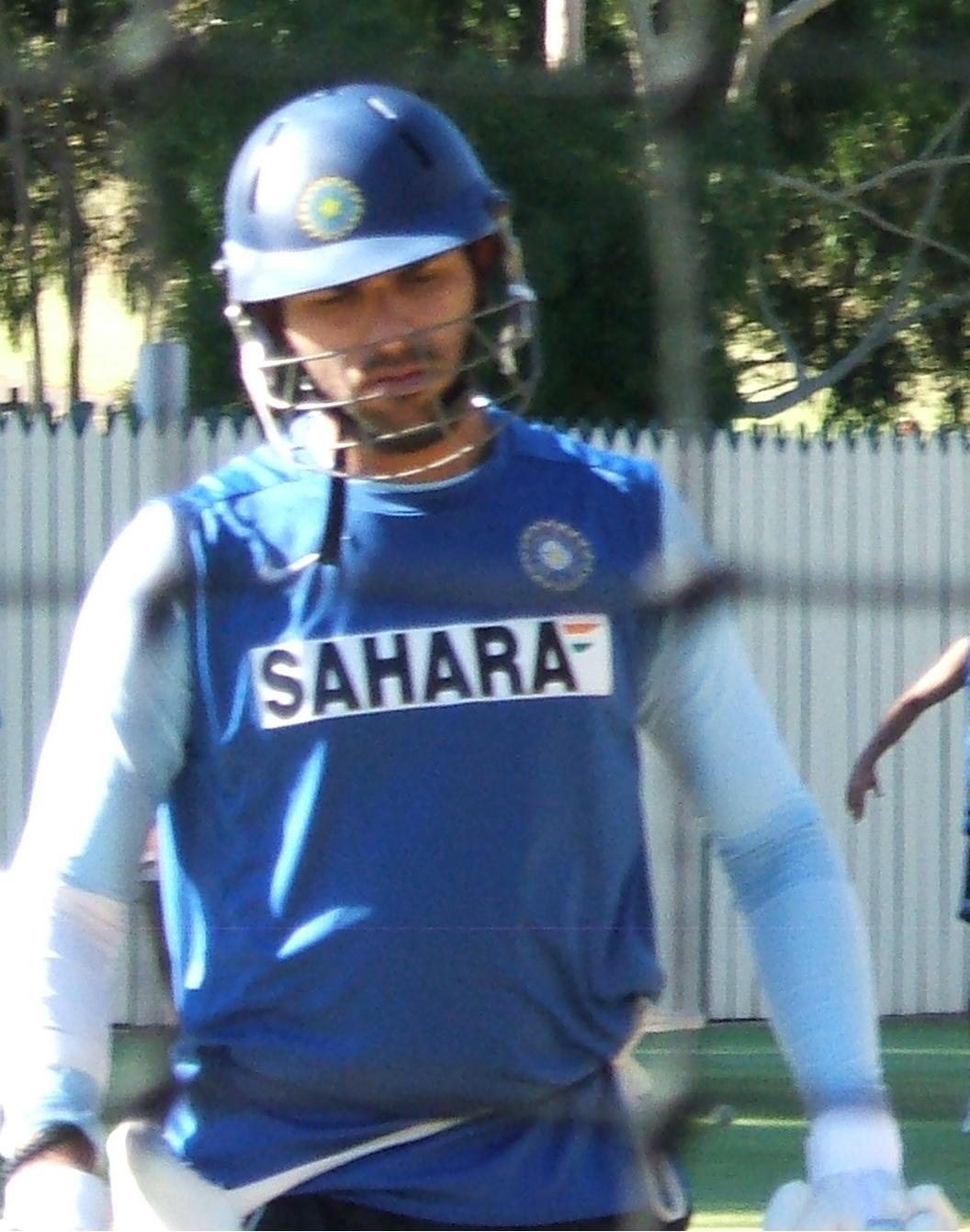 Yuvraj Singh batting at Adelaide Oval